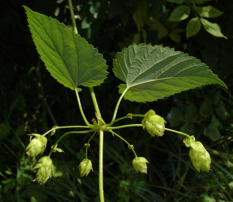 Houblon, Moret-sur-Loing, 29 août 2004